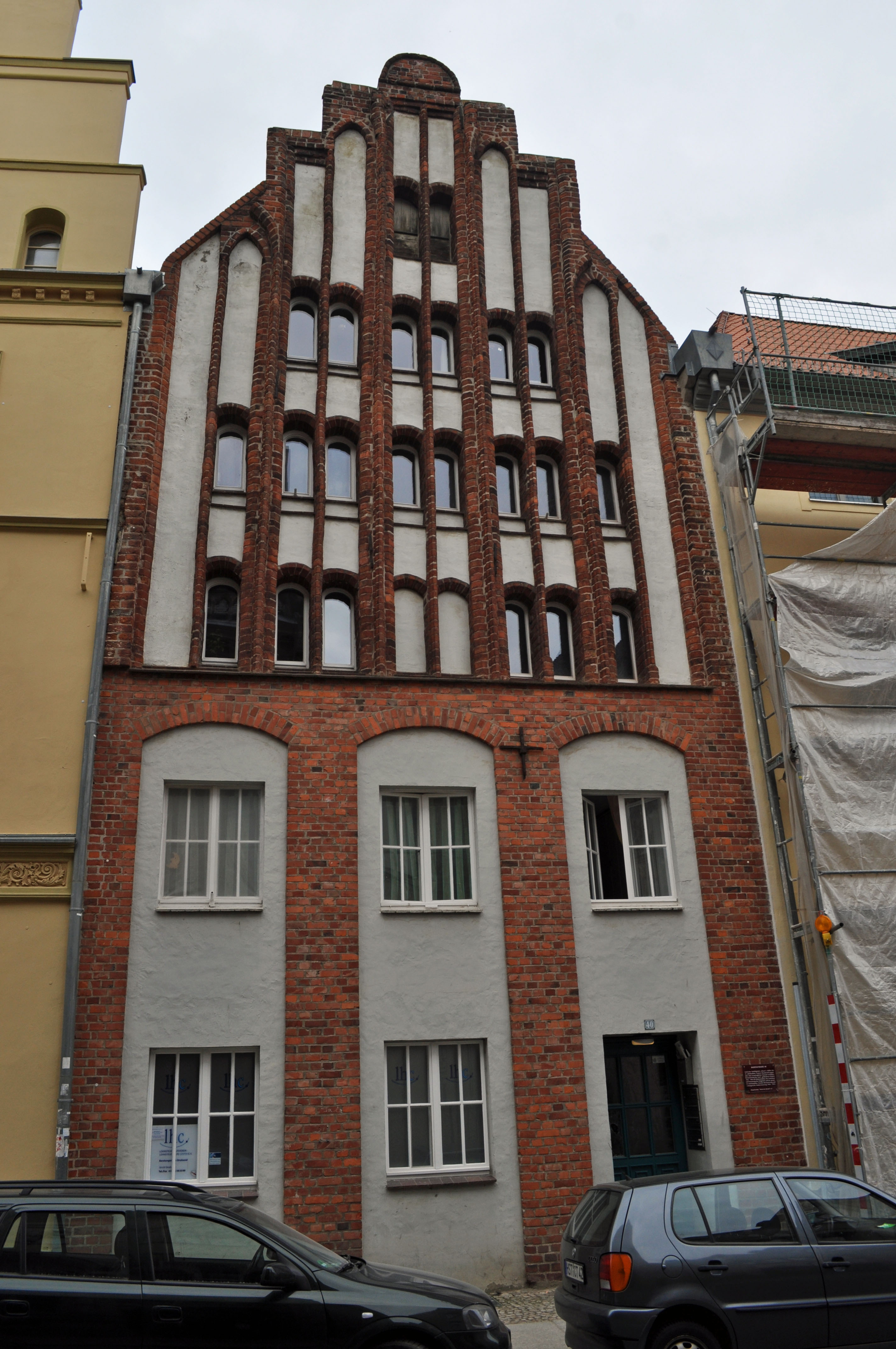 Gebäude bzw. Gebäudedetail in Stralsund. Straße und Hausnummer siehe Dateiname.